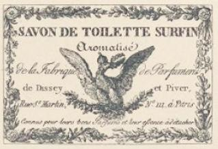 Étiquette de Dissey et Piver pour un savon aromatisé. Adresse : rue Saint-Martin 111 [Paris]. « Connus pour leurs bons parfums et leur essence à détacher ».